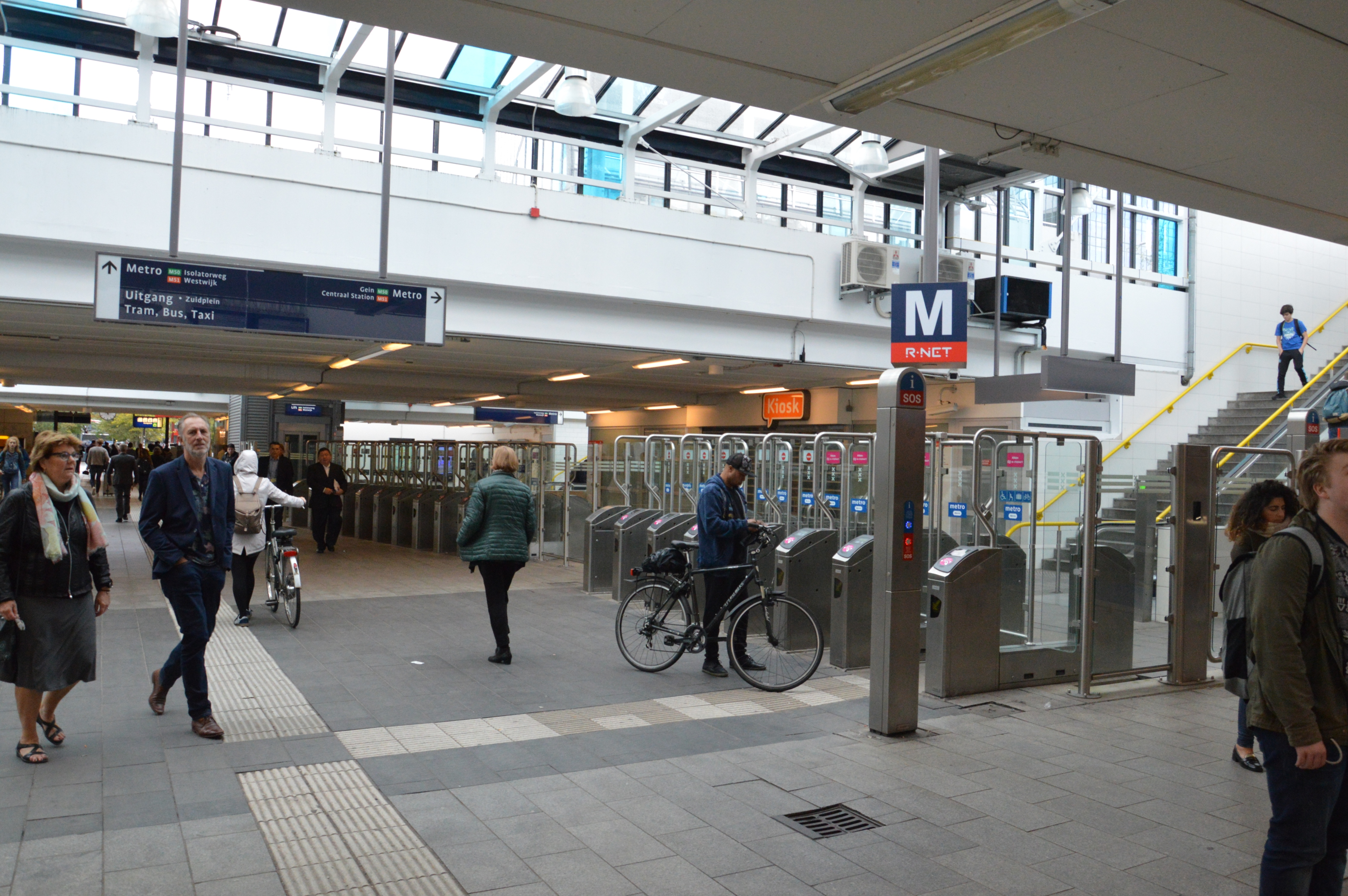 Station Amsterdam Zuid. Ingang metrostation.